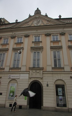 споруда